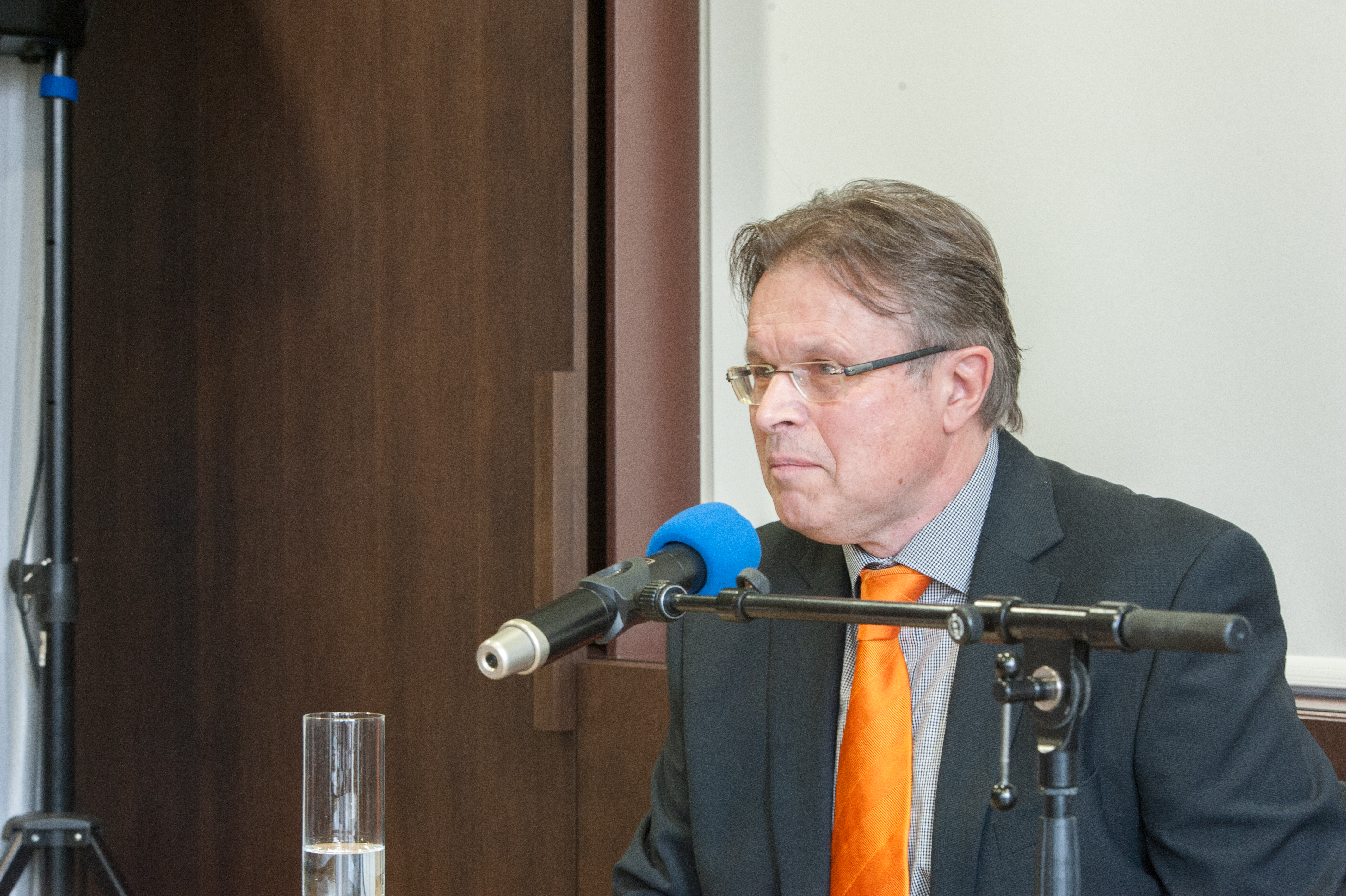 Jürgen Mette bei der Vorstellung seines Buches "Alles außer Mikado" im Marburger Medienhaus am 15. Januar 2013.